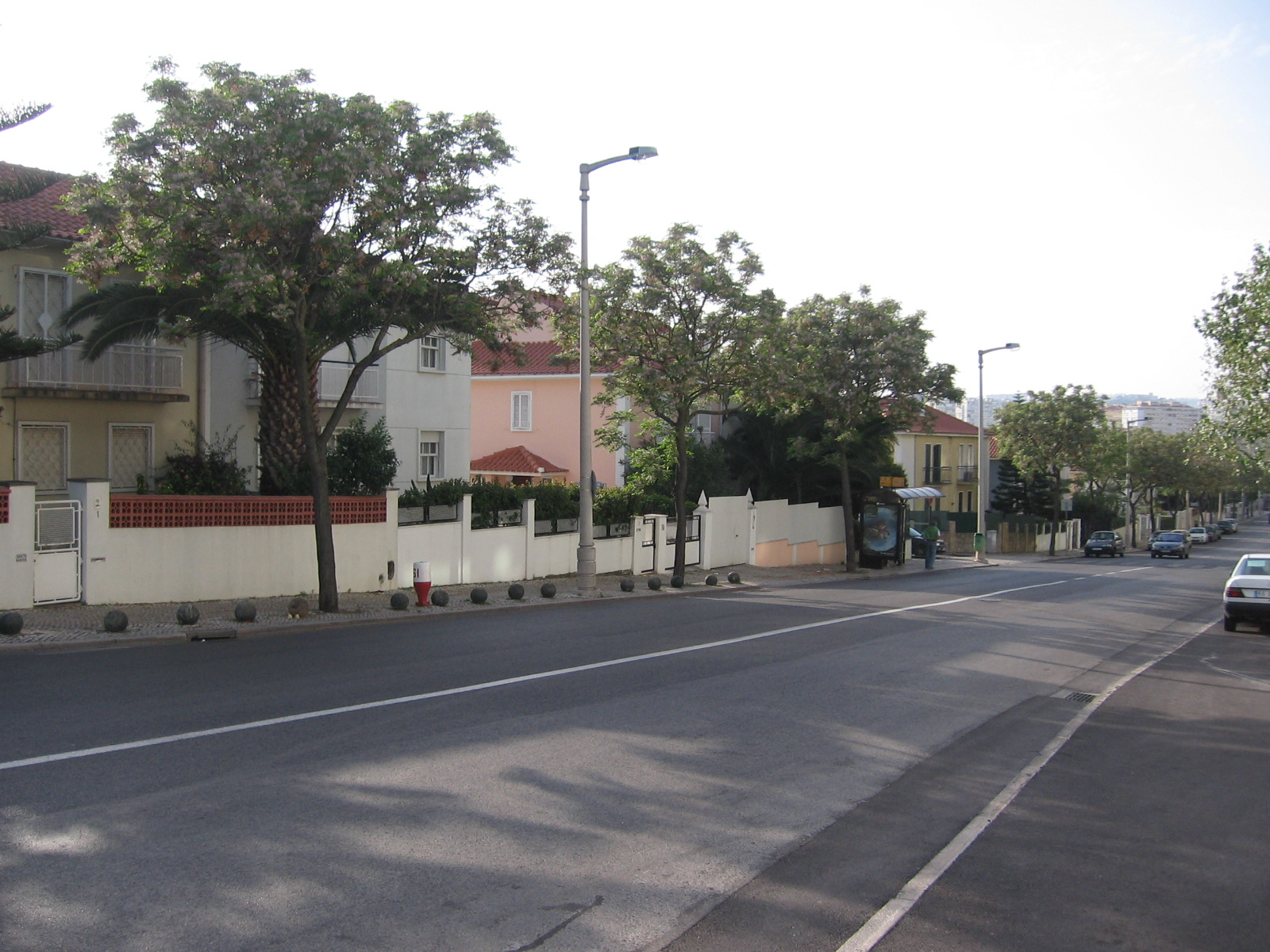 Bairro de Santa Cruz, Lisboa